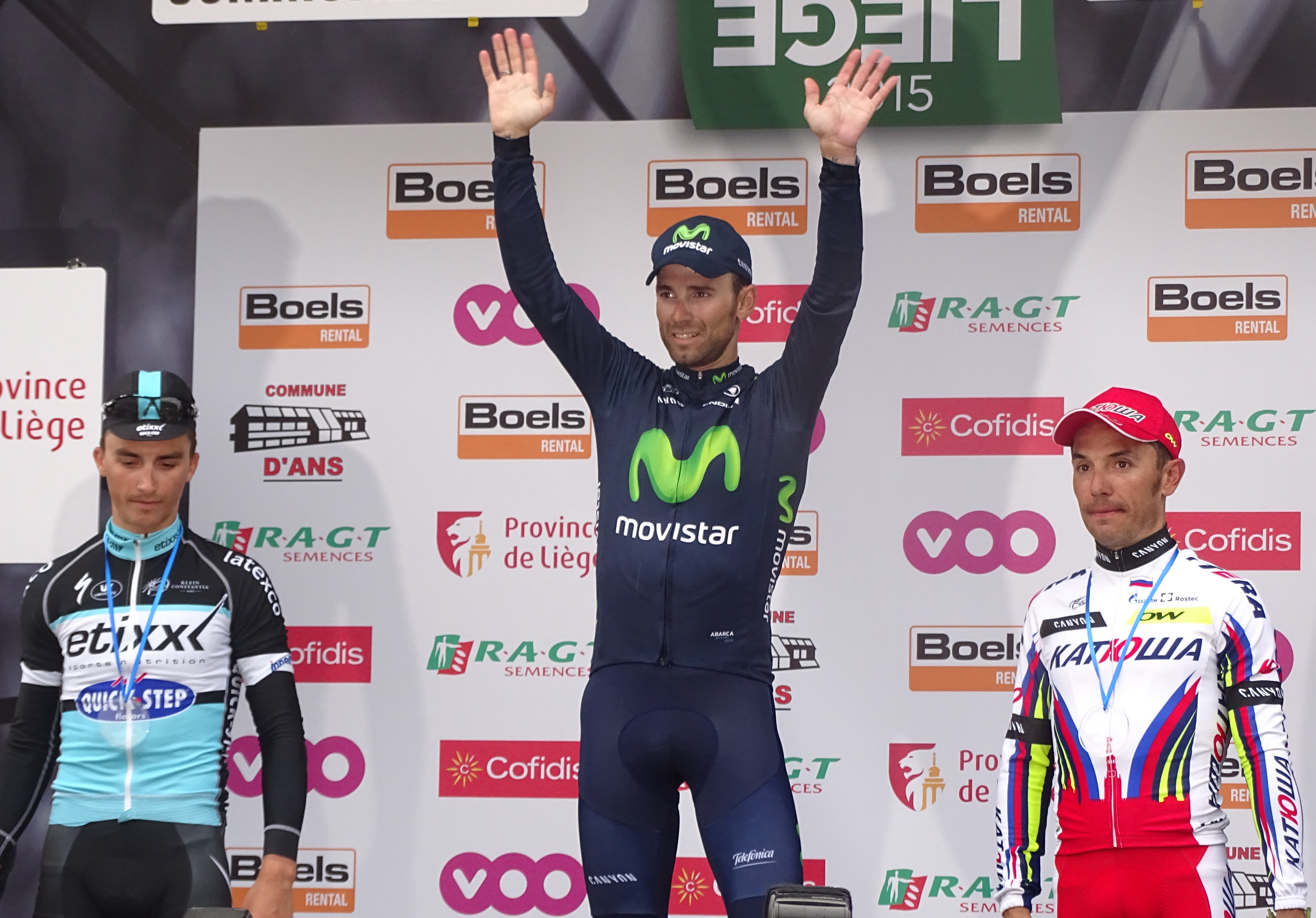 Reportage réalisé le dimanche 26 avril à l'occasion de l'arrivée de Liège-Bastogne-Liège 2015 à Ans, Belgique.